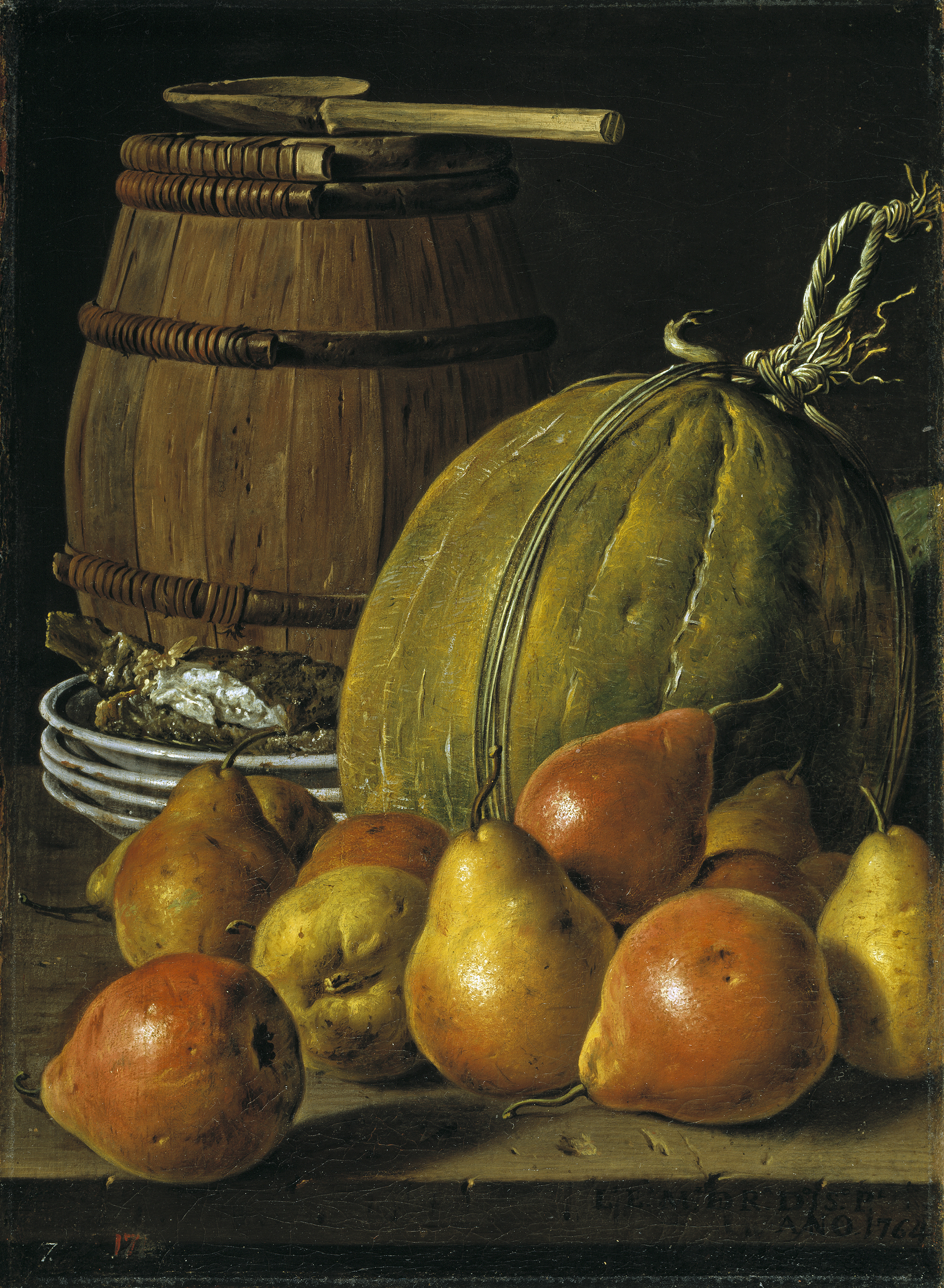 Bodegón: peras, melón, platos y barril, pintura al óleo realizada por Luis Egidio Meléndez y conservada en el Museo del Prado. Madrid